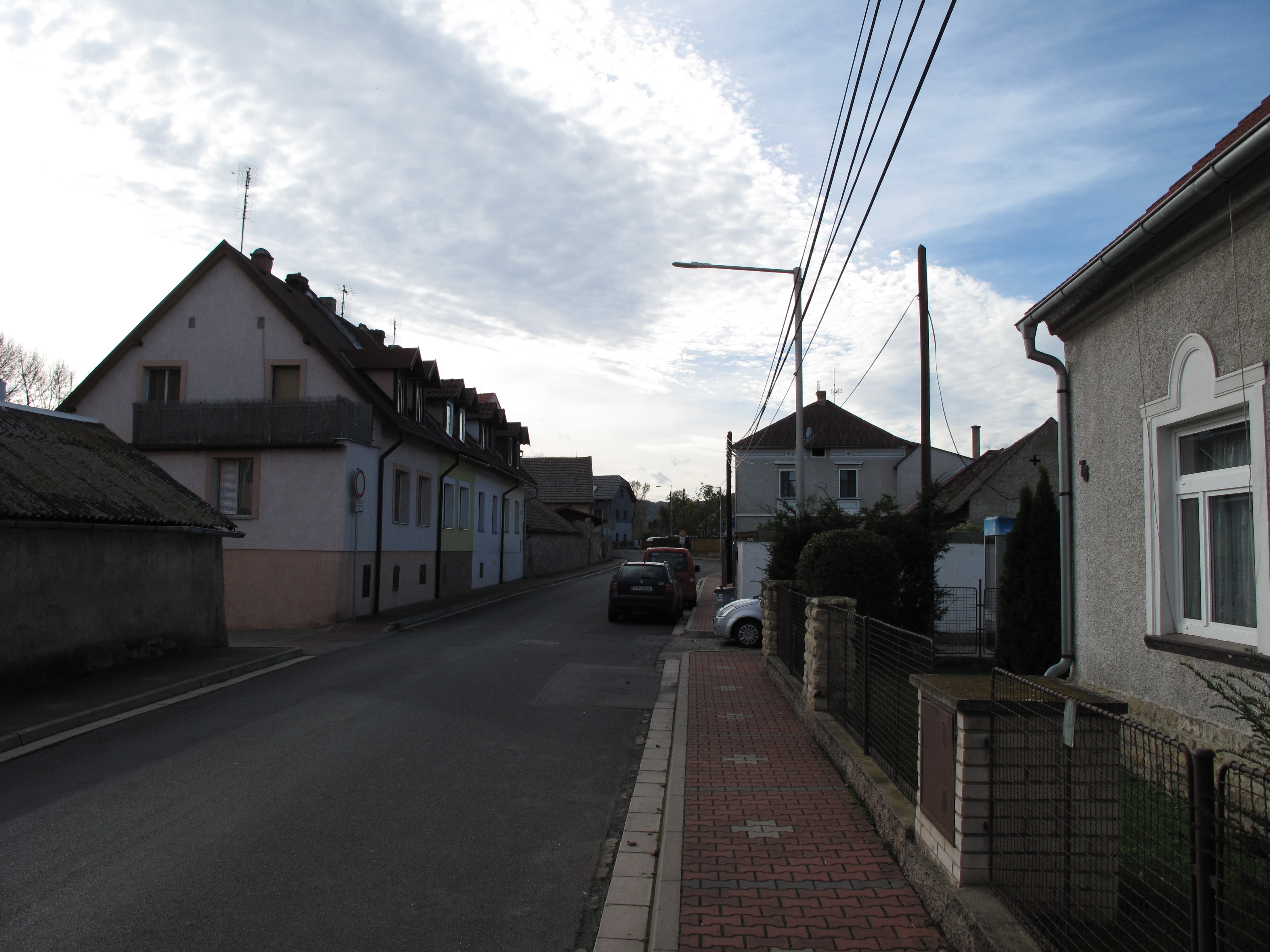 Ulice v Píšťanech. Okres Litoměřice, Česká republika.